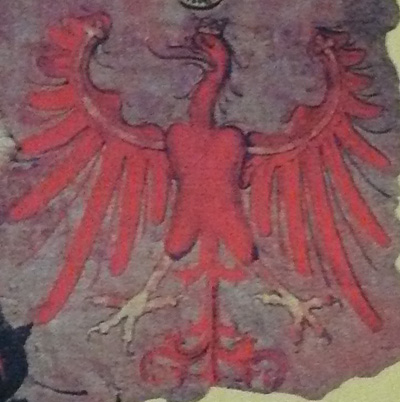 Wappen von Tirol